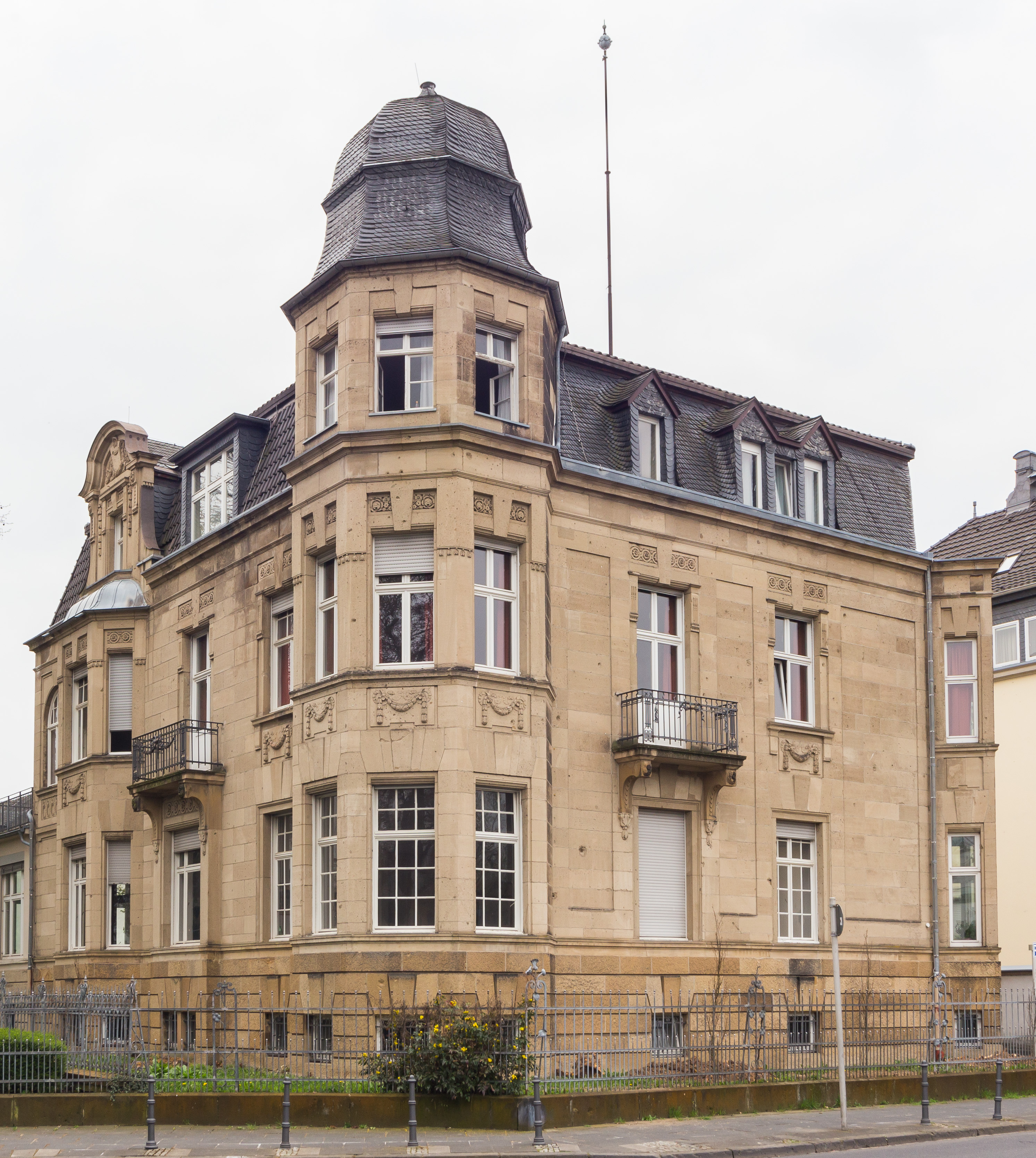 Villa Eschbaum (Teil der Universitäts-Kinderklinik), Tempelstraße 8, Bonn: Ansicht aus Norden